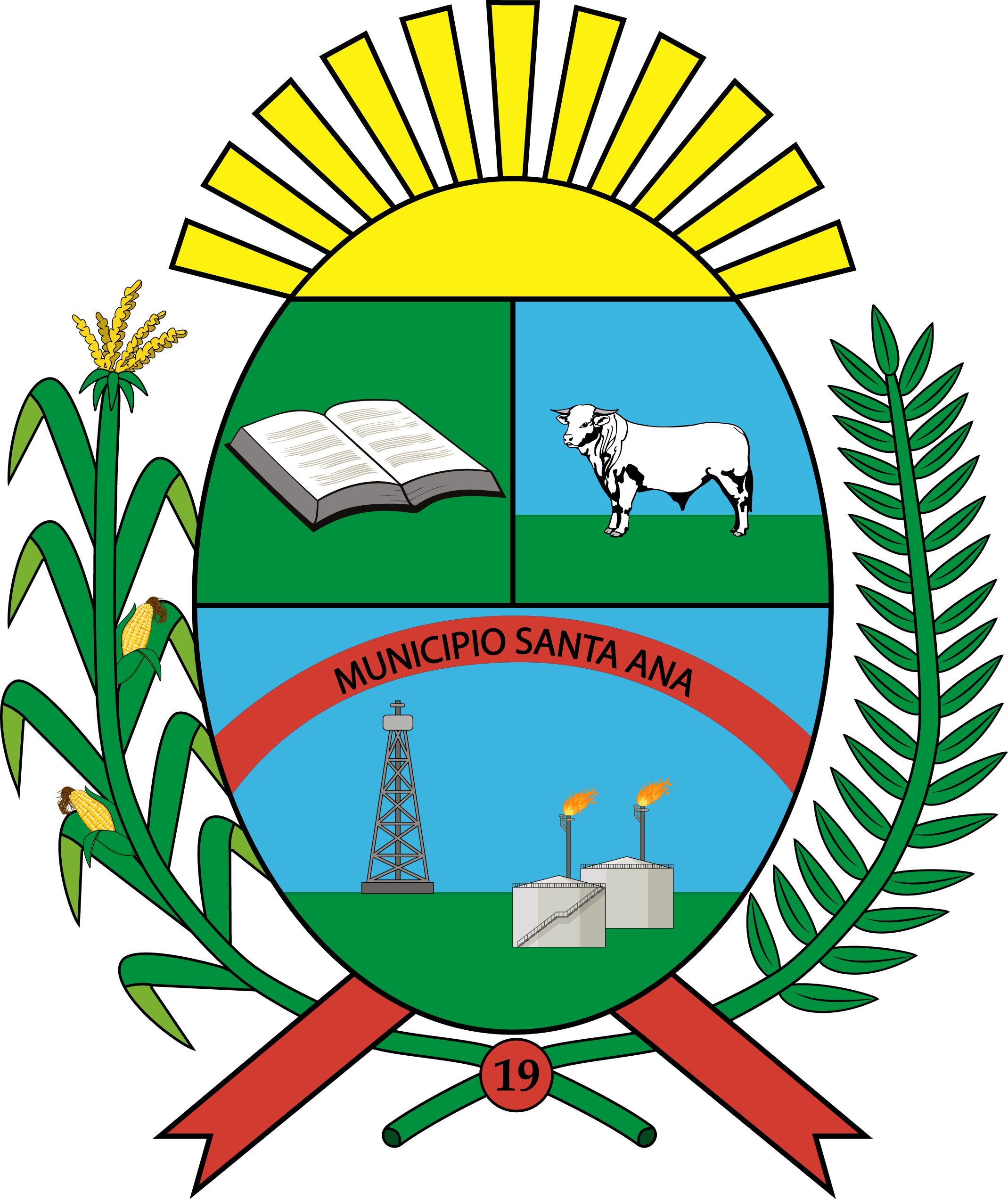 Escudo del Municipio Santa Ana (Anzoátegui)